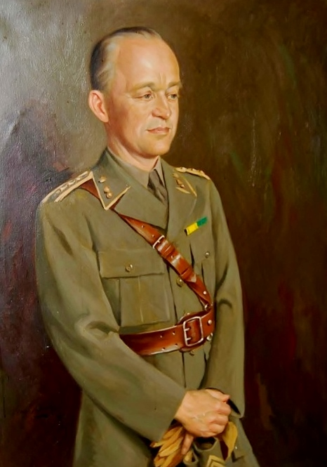 Oljemålning föreställande Överste Fernando Odenrick, Chef för Norrbottens artillerikår (A 5), Boden, 1.10 1942 - 30.6 1943. Chef för Norrlands artilleriregemente åren 1943-1947.